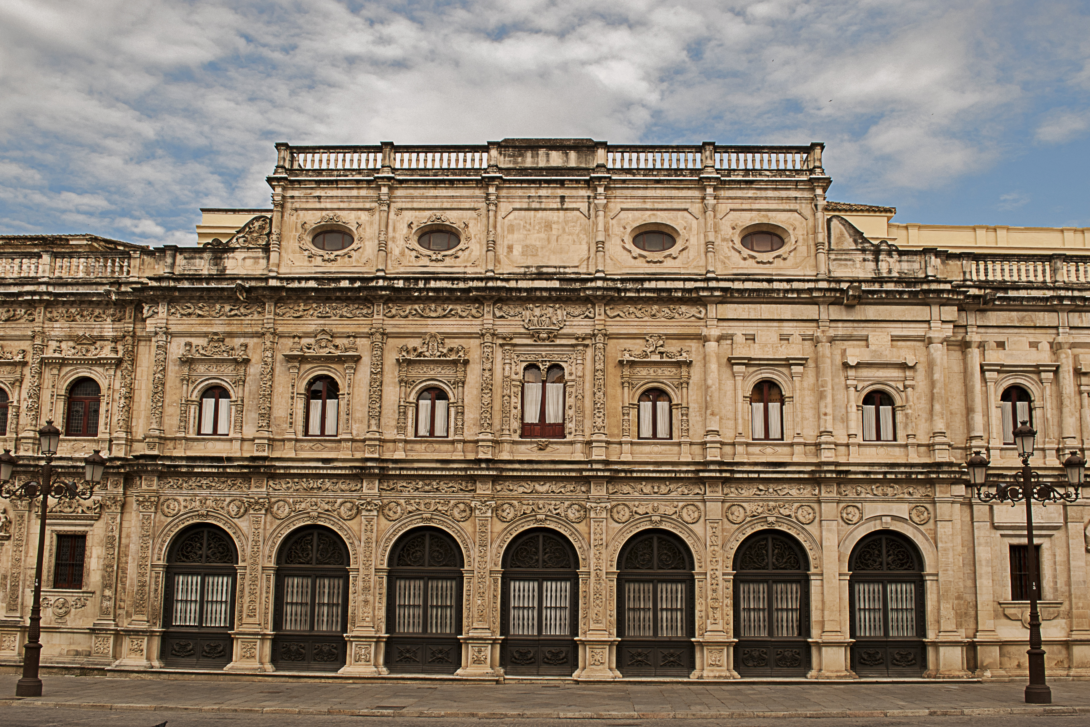 Fachada a plaza de San Francisco del edificio del Ayuntamiento de Sevilla.